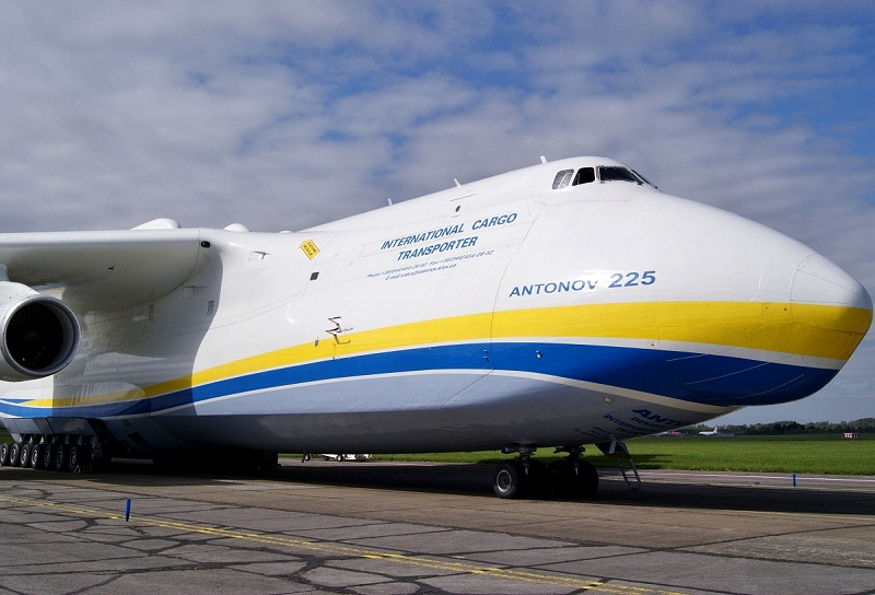 An-225 Mrija